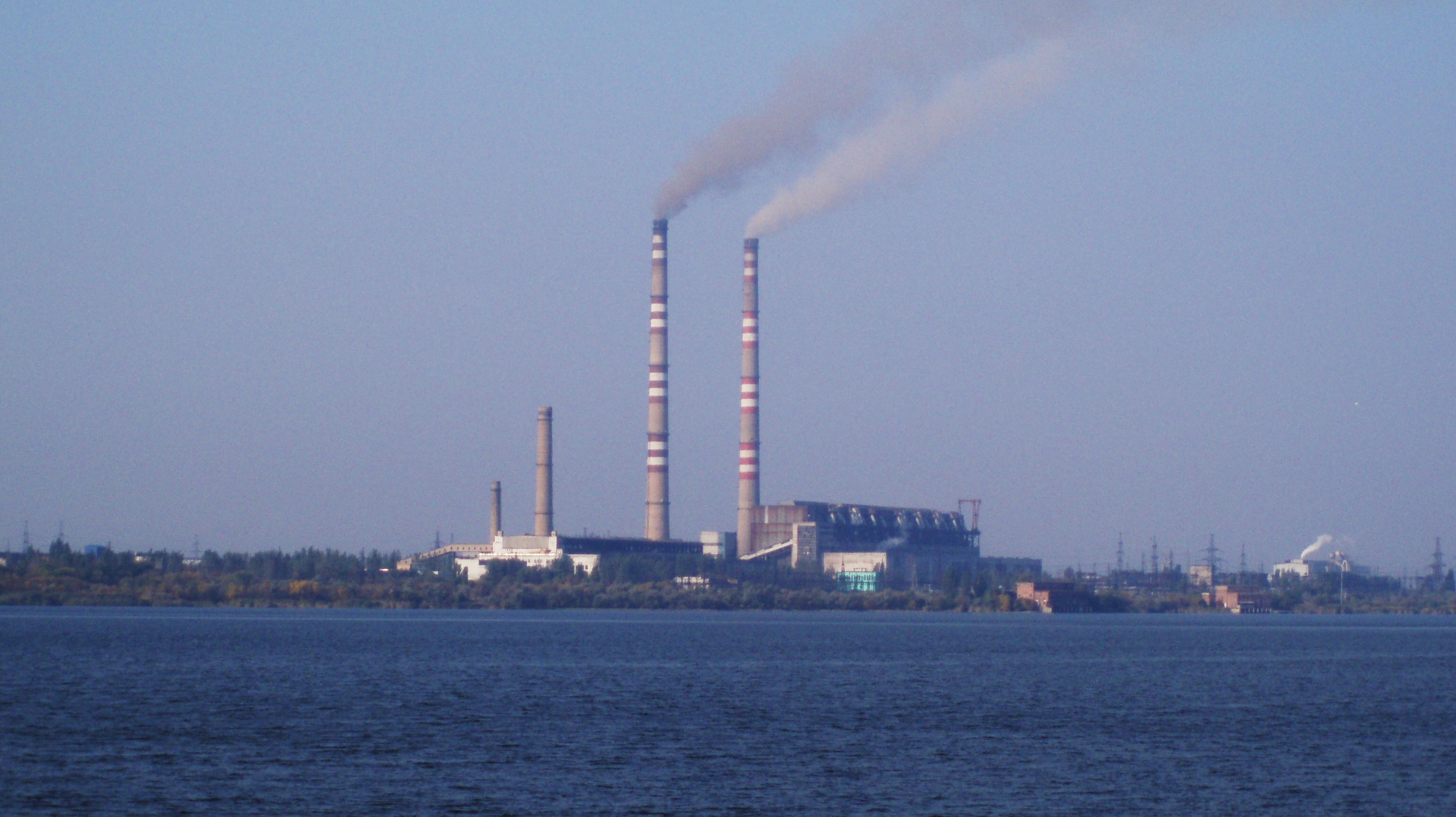 Кураховская ТЕС